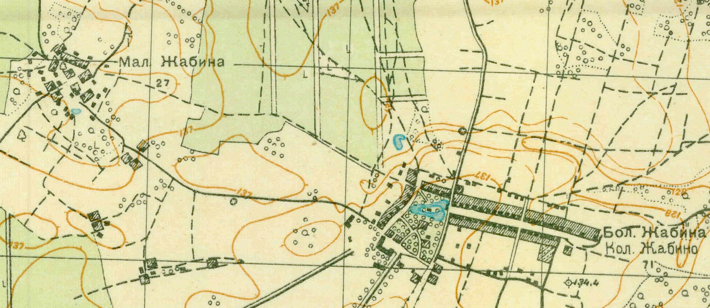 Топографическая карта Ленинградской области, квадрат О-35-24-А-б (Витино), деревня Жабино